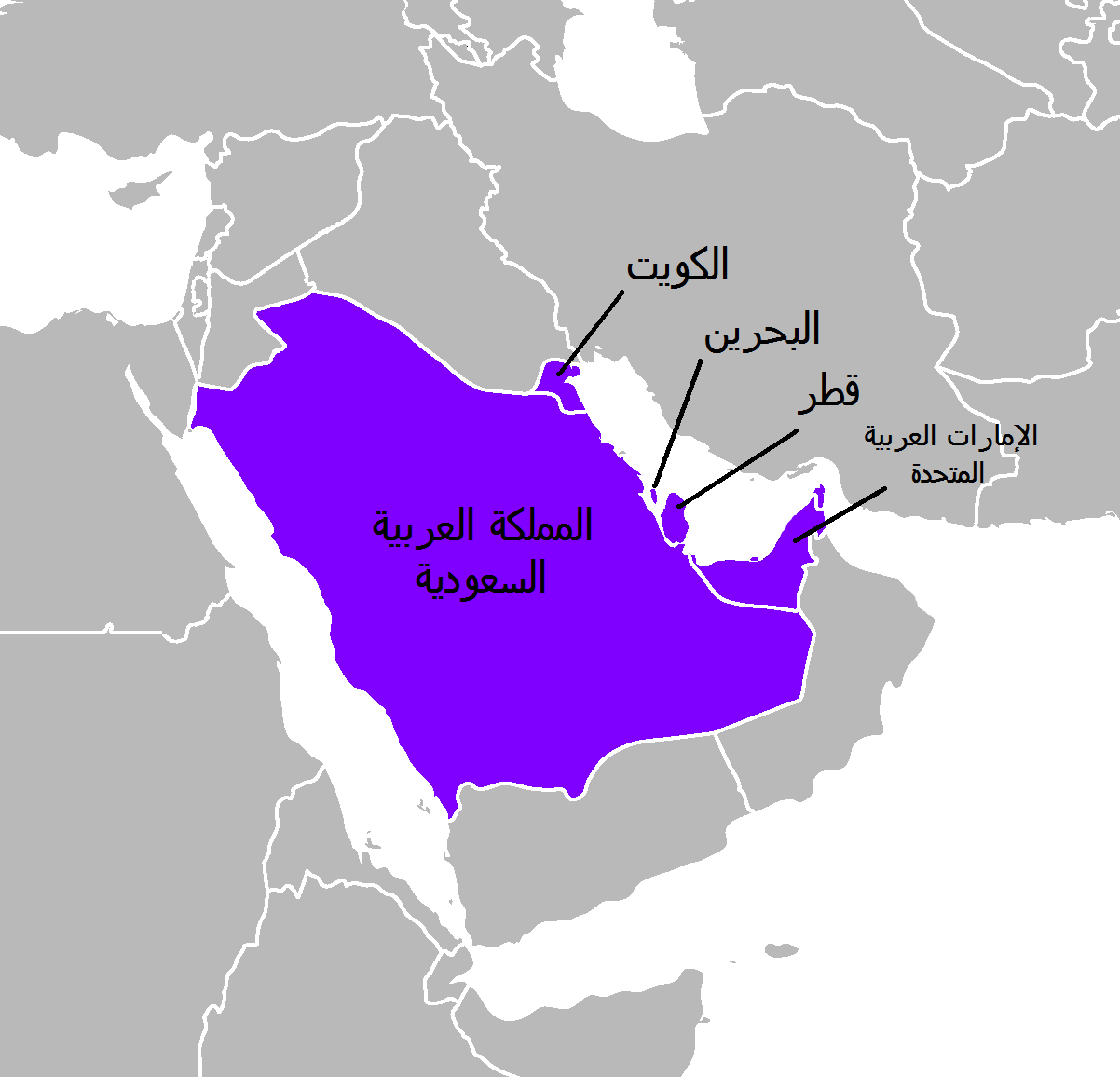 خارطة تبين المناطق التي يسكنها قبيلة آل فخرو --- قبيلة آل فخرو عرفوا ايضاً بـ آل فخروه و آل بوفخروه نسبةً إلى الجد فاخر من حنظلة من بني تميم المضرية العدنانية.